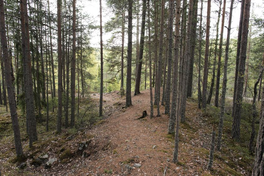 Ormekula, gammelt forsvarsanlegg i RIngerike kommune. Foto: Bjørn Johnsen. Fra Riksantikvarens Kulturminnesøk.